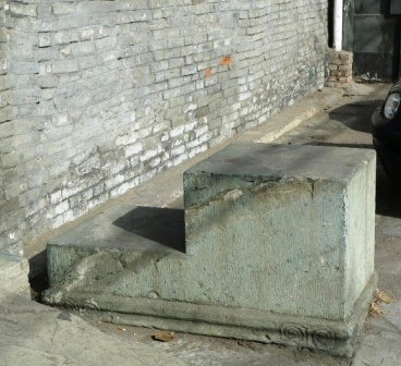 上马石 拍摄